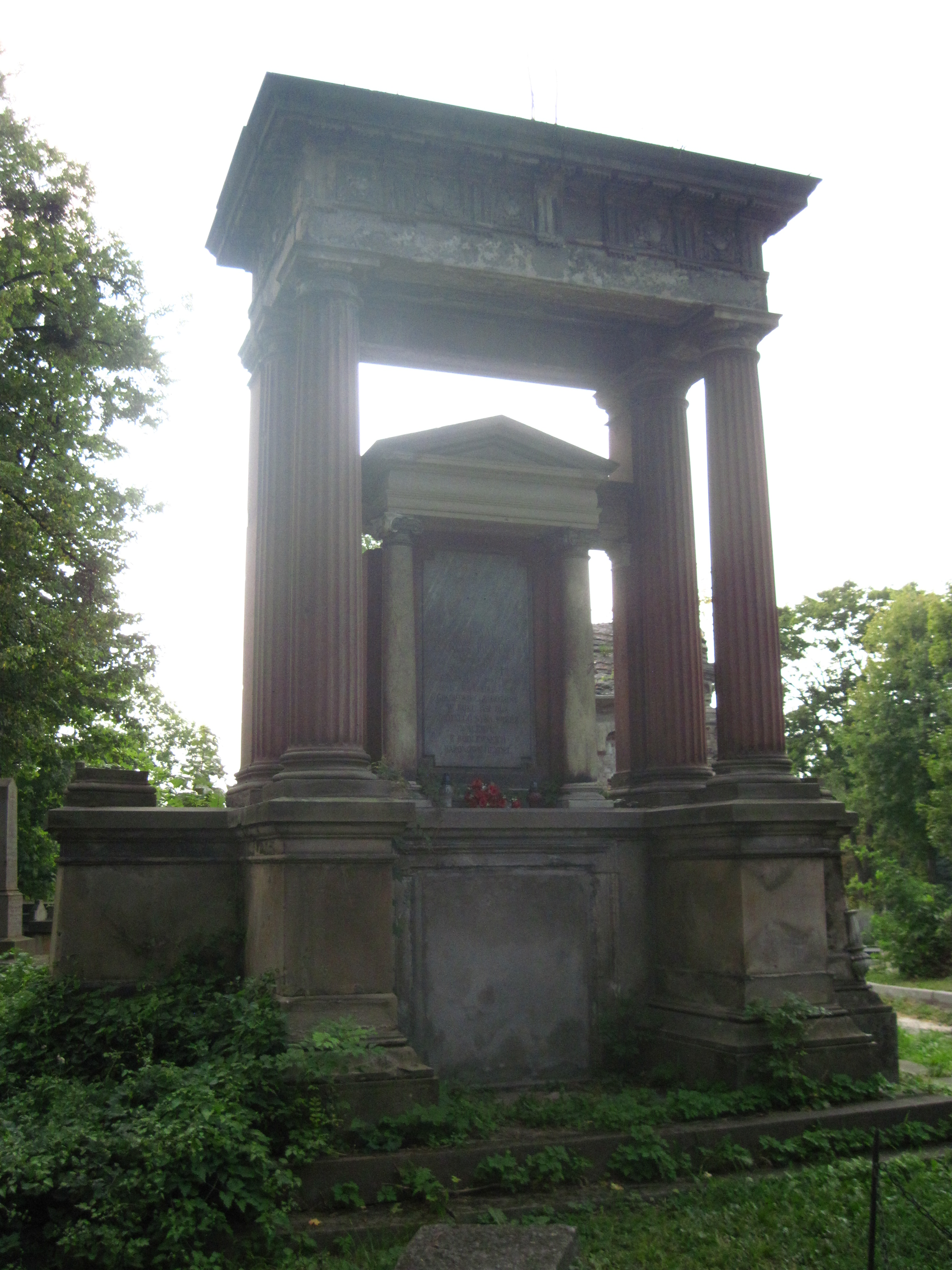 Могила барона Гейдля з Ромашівки, Личаків, 2015